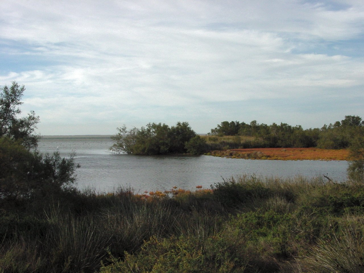 étang de Vaccarès, Camargue (France)